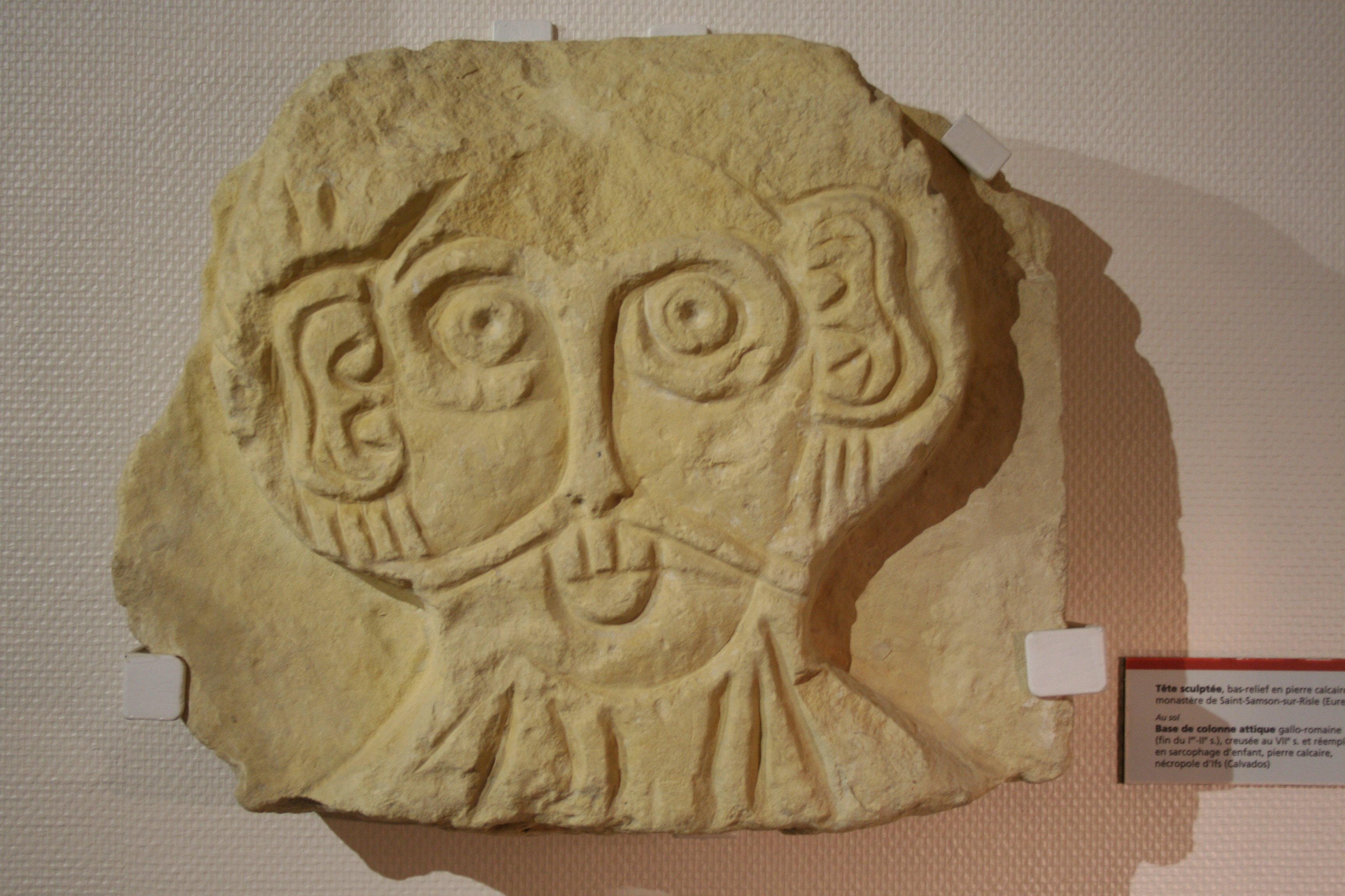 tête provenant de Saint Samson sur Risle